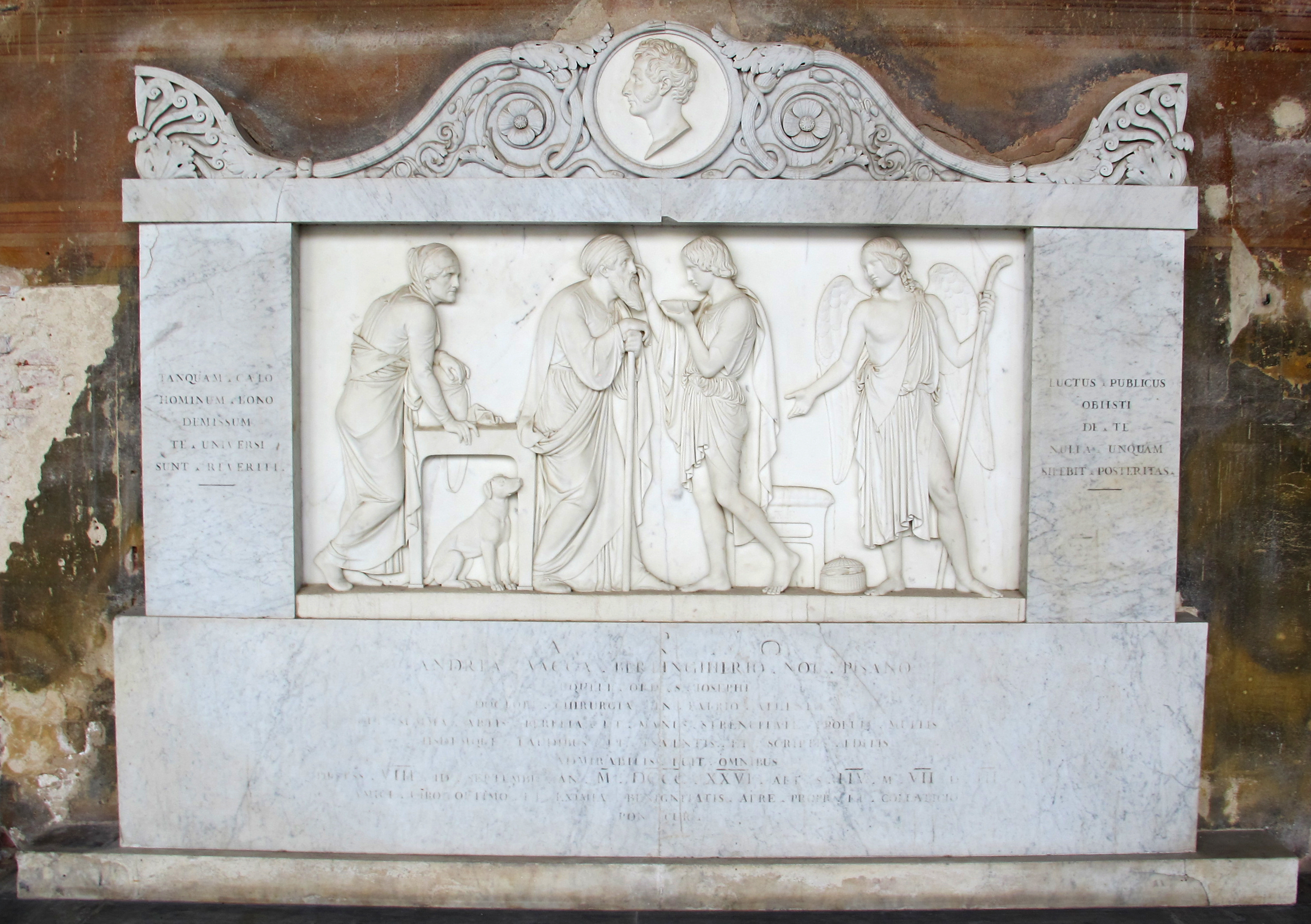 Bertel Thorvaldsen, monumento di Andrea Vaccà (1826 circa)